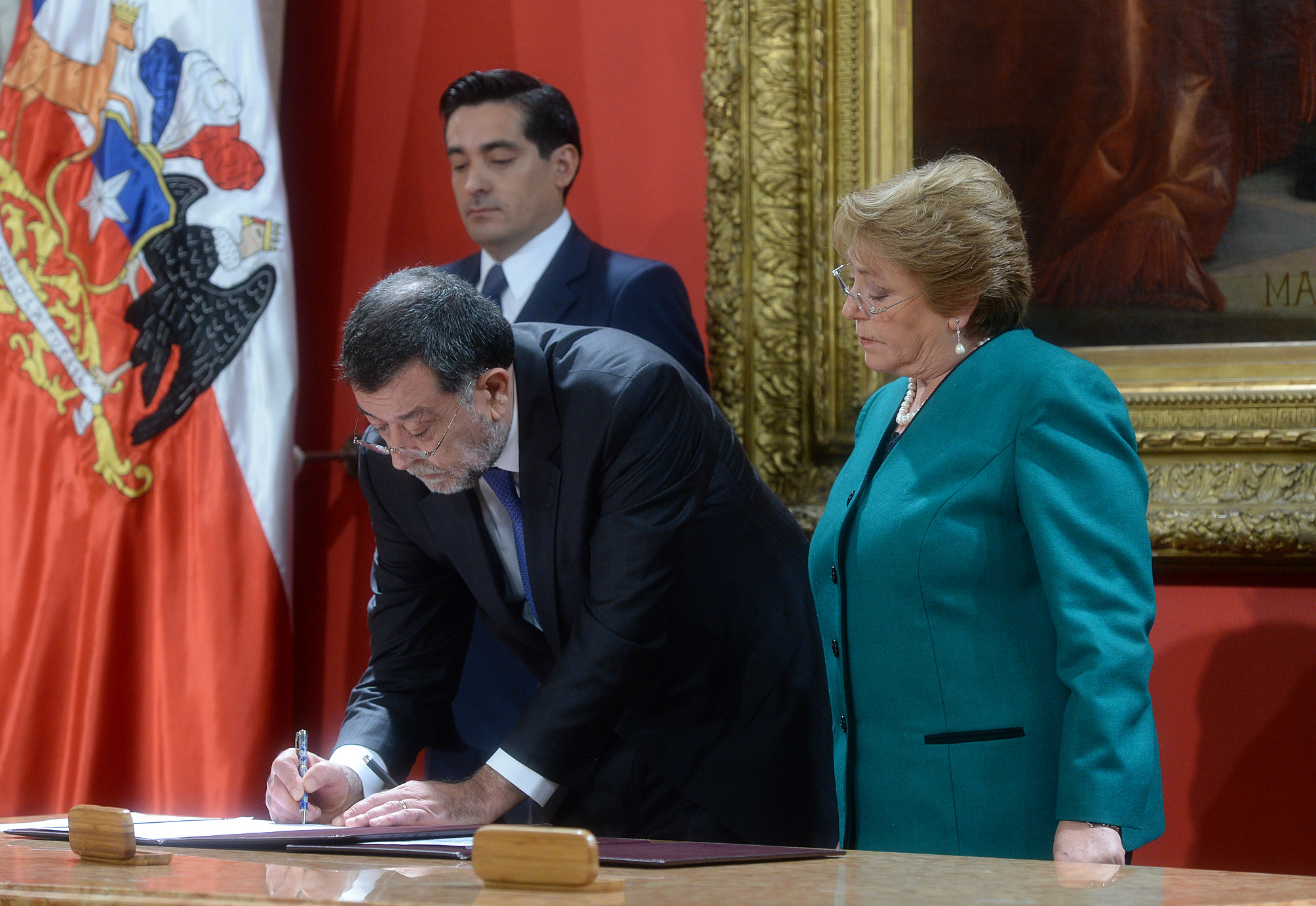 11/05/15 Cambio de Gabinete, Asume Ministro Marcelo Diaz.